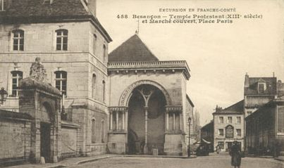 Carte postale du temple du Saint-Esprit de Besançon (culte Réformé) dans les années 1910, utilisée lors d'une correspondance le 4 novembre 1914.